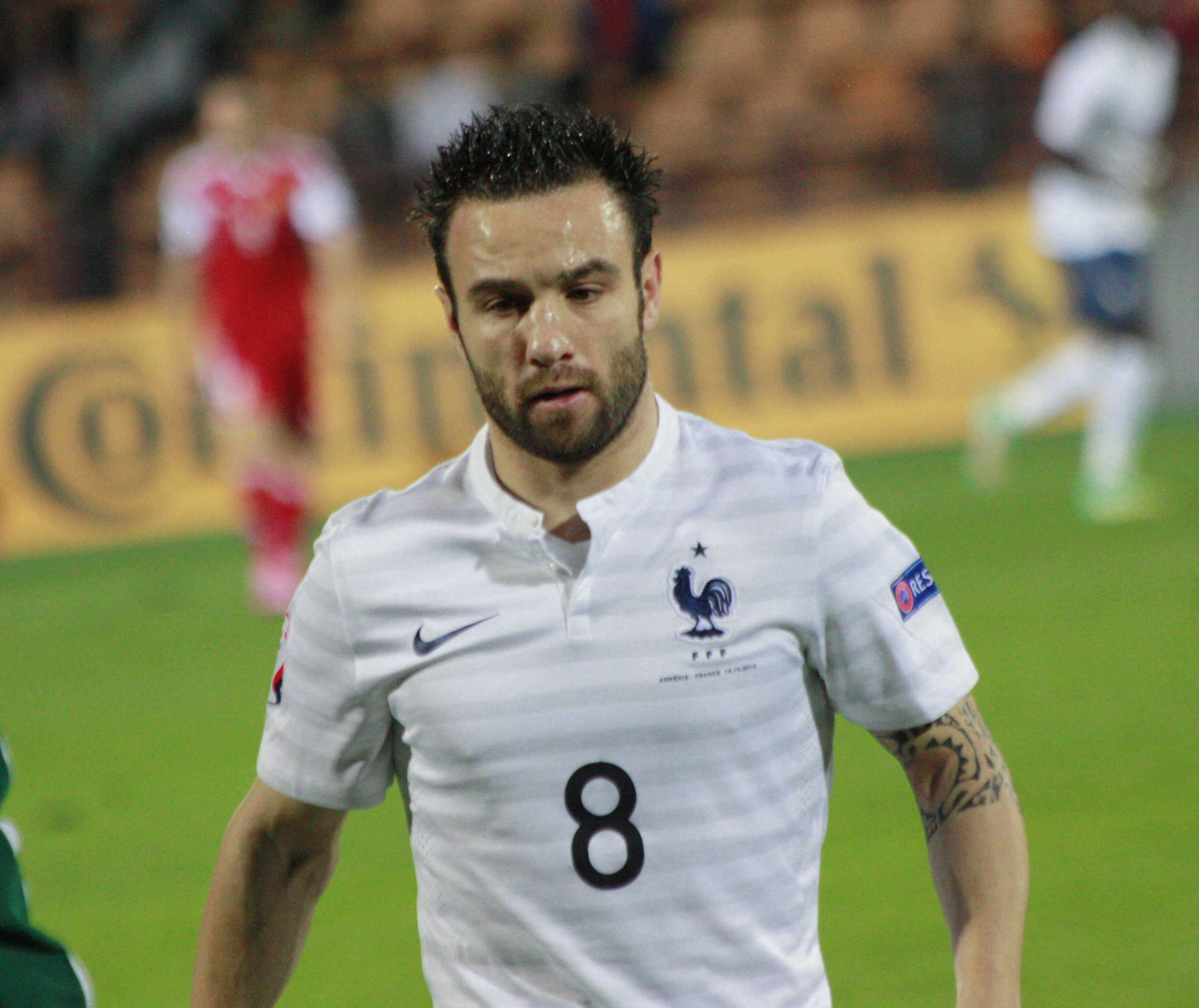 _MG_2896